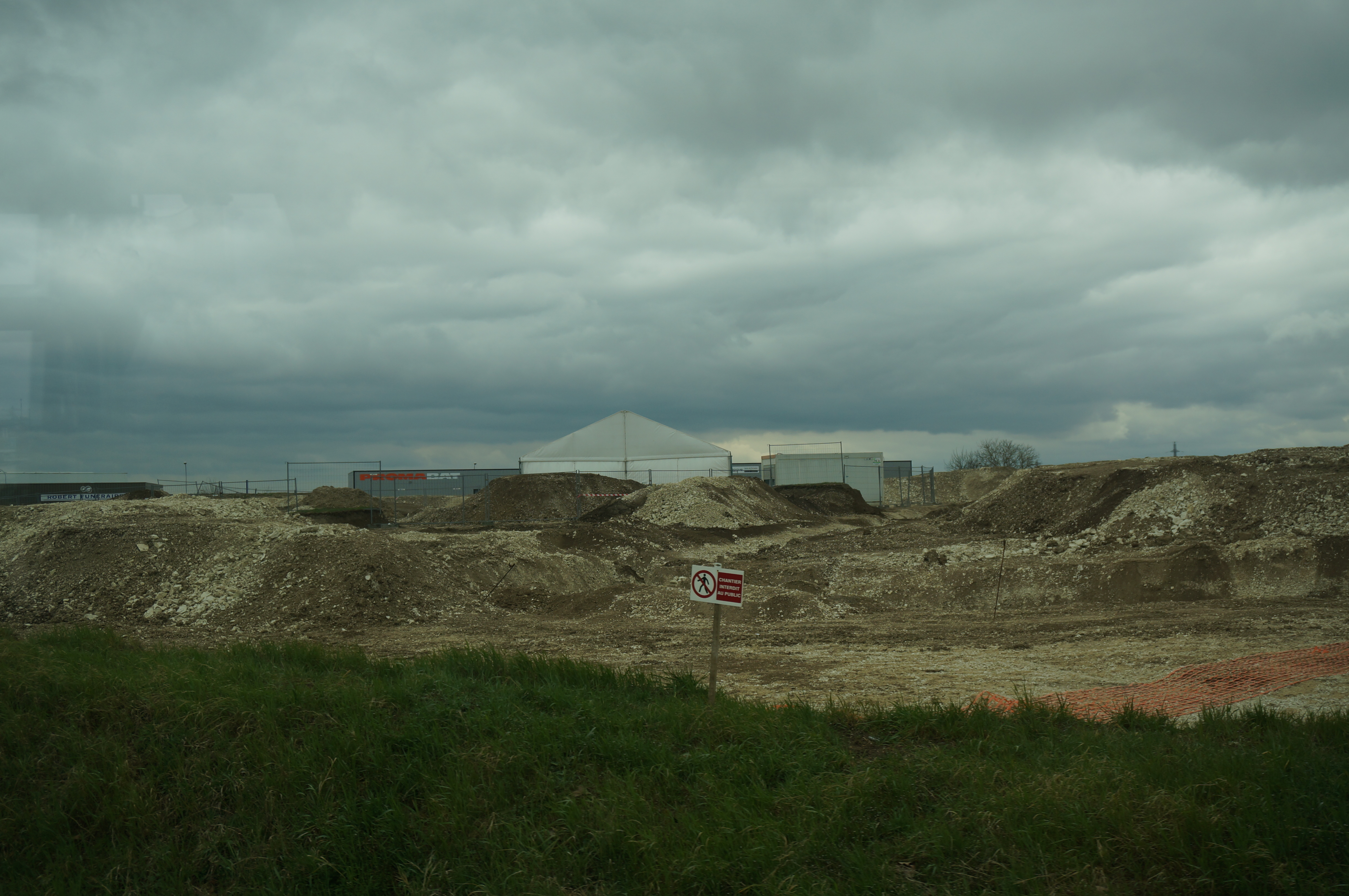 fouilles d'archéologie préventive à Lavau.